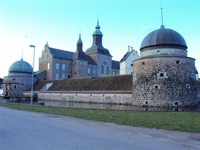 Vadstena - hrad